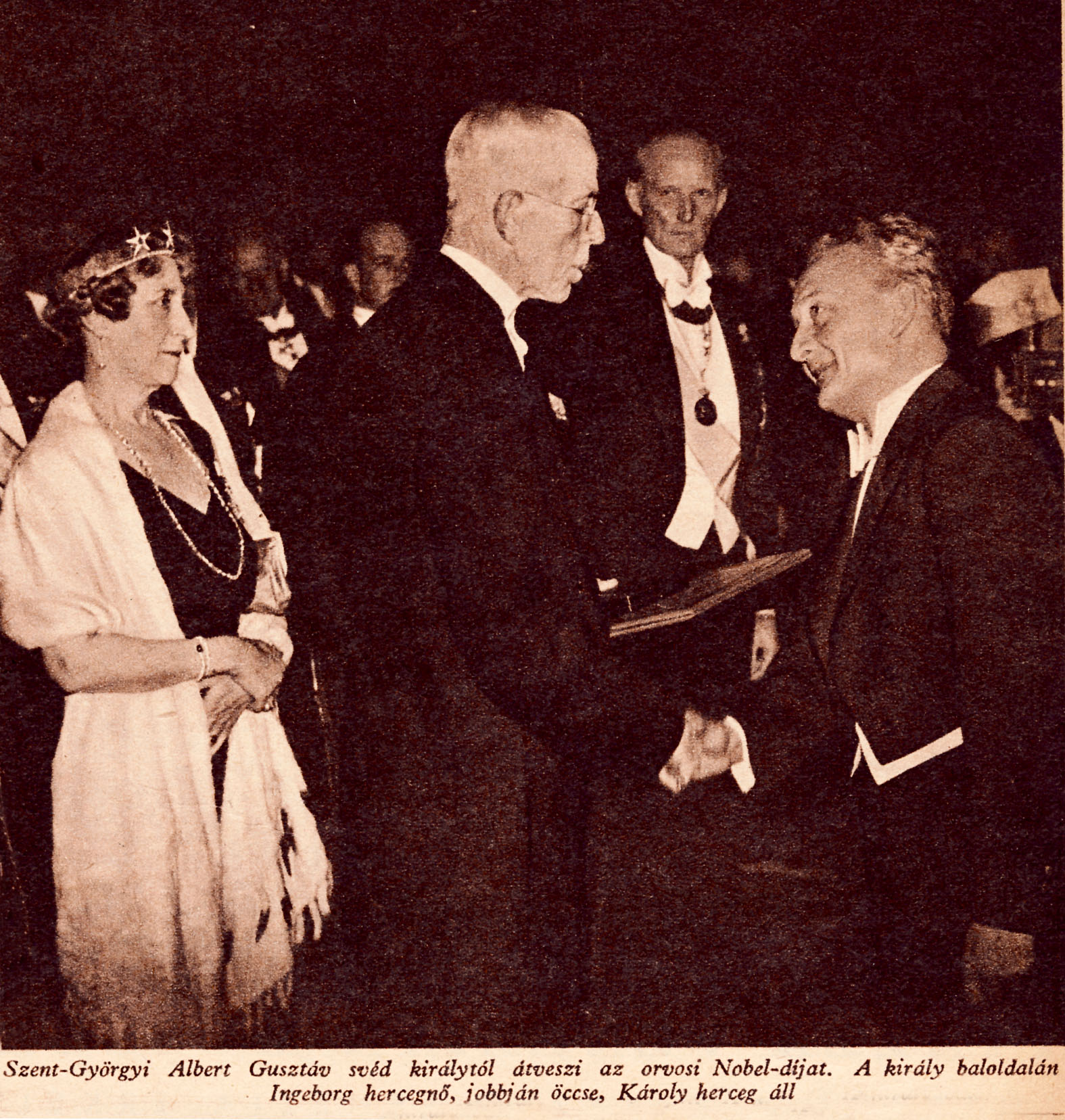 Szent-Györgyi Albert átveszi a Nobel-díjat. Stockholm, Svédország.